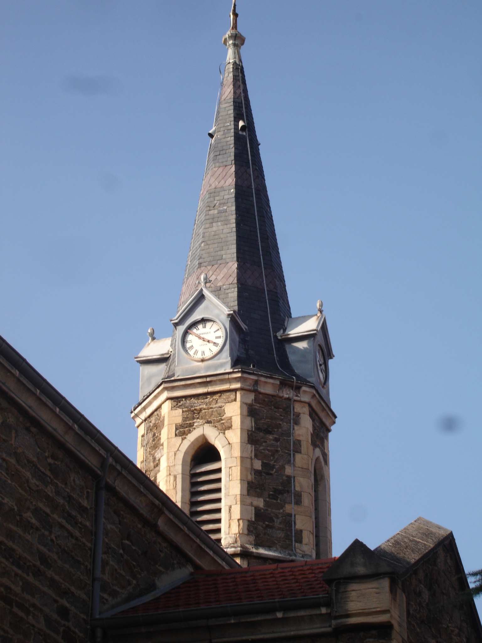 Sérézin-du-Rhône : le clocher de l'église